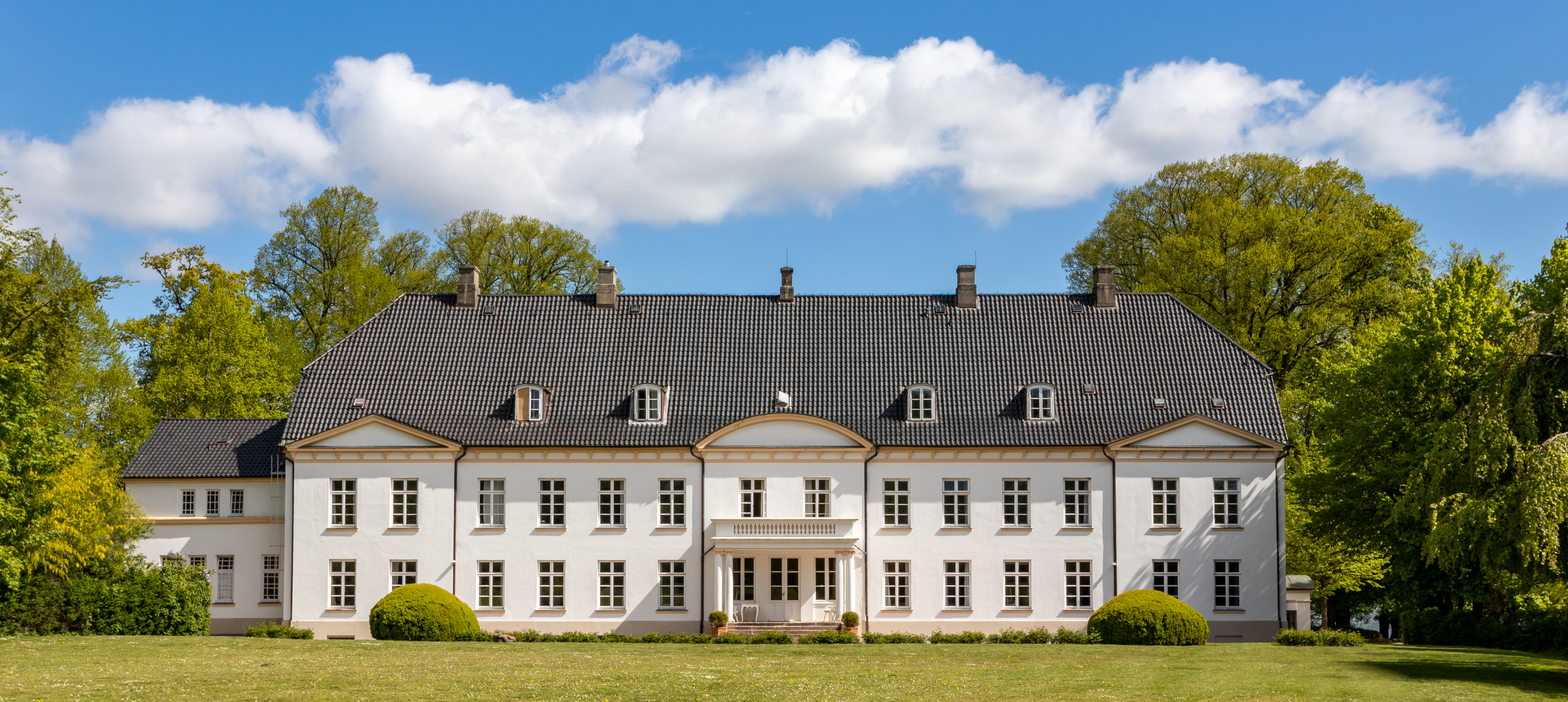 Schloss Louisenlund - Haupthaus, Gartenfassade